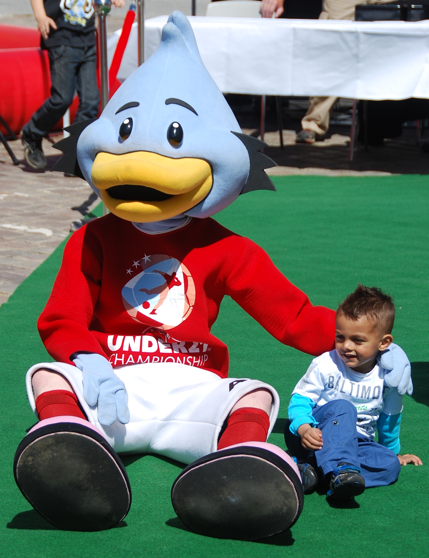 "Andy", maskotten for U-21 Europamesterskabet i fodbold 2011 i Danmark. Her set i Viborg.